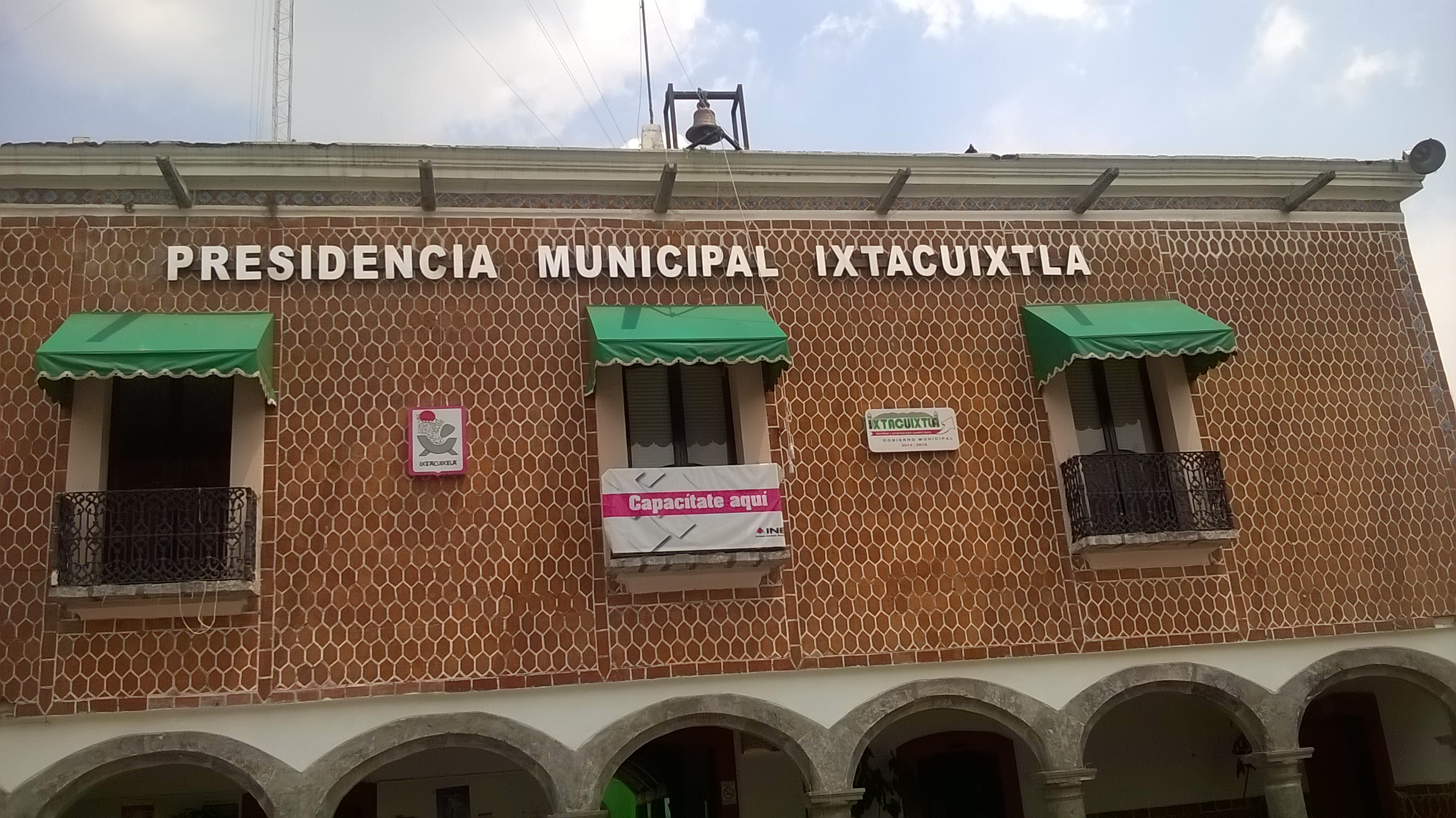 Presidencia Municipal de Ixtacuixtla, Tlaxcala